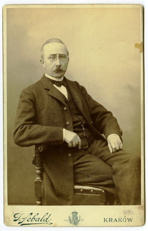 Zdjęcie Augusta Witkowskiego z 1905 roku.